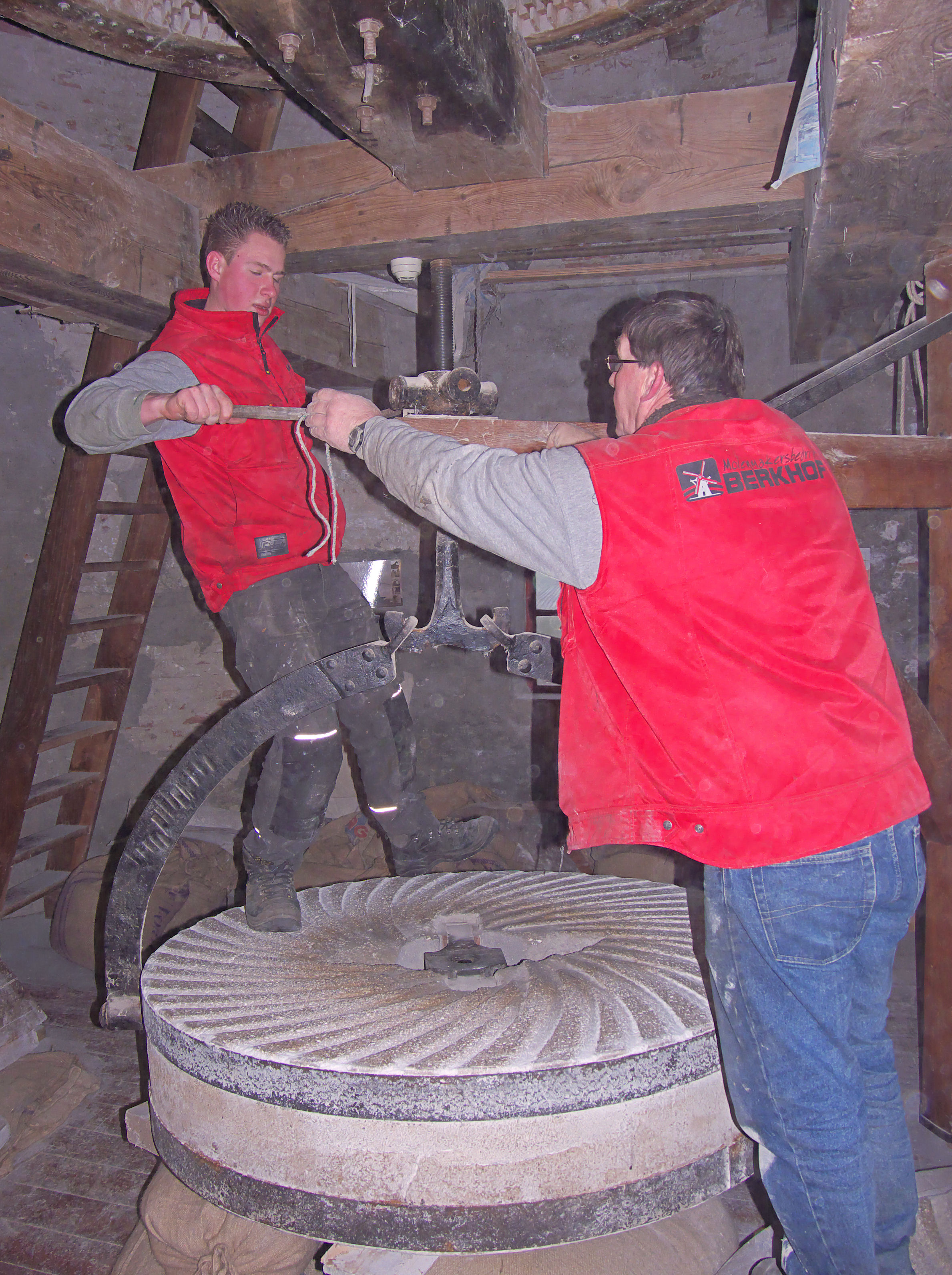 Molen De Hoop, Garderen, openleggen maalkoppel